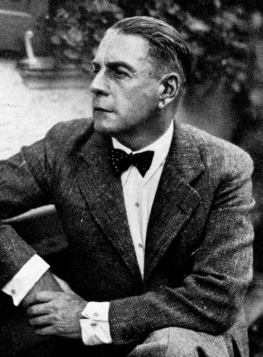 Alexander Castell (Heinrich Wilhelm Lang), (1883–1939) Schriftsteller